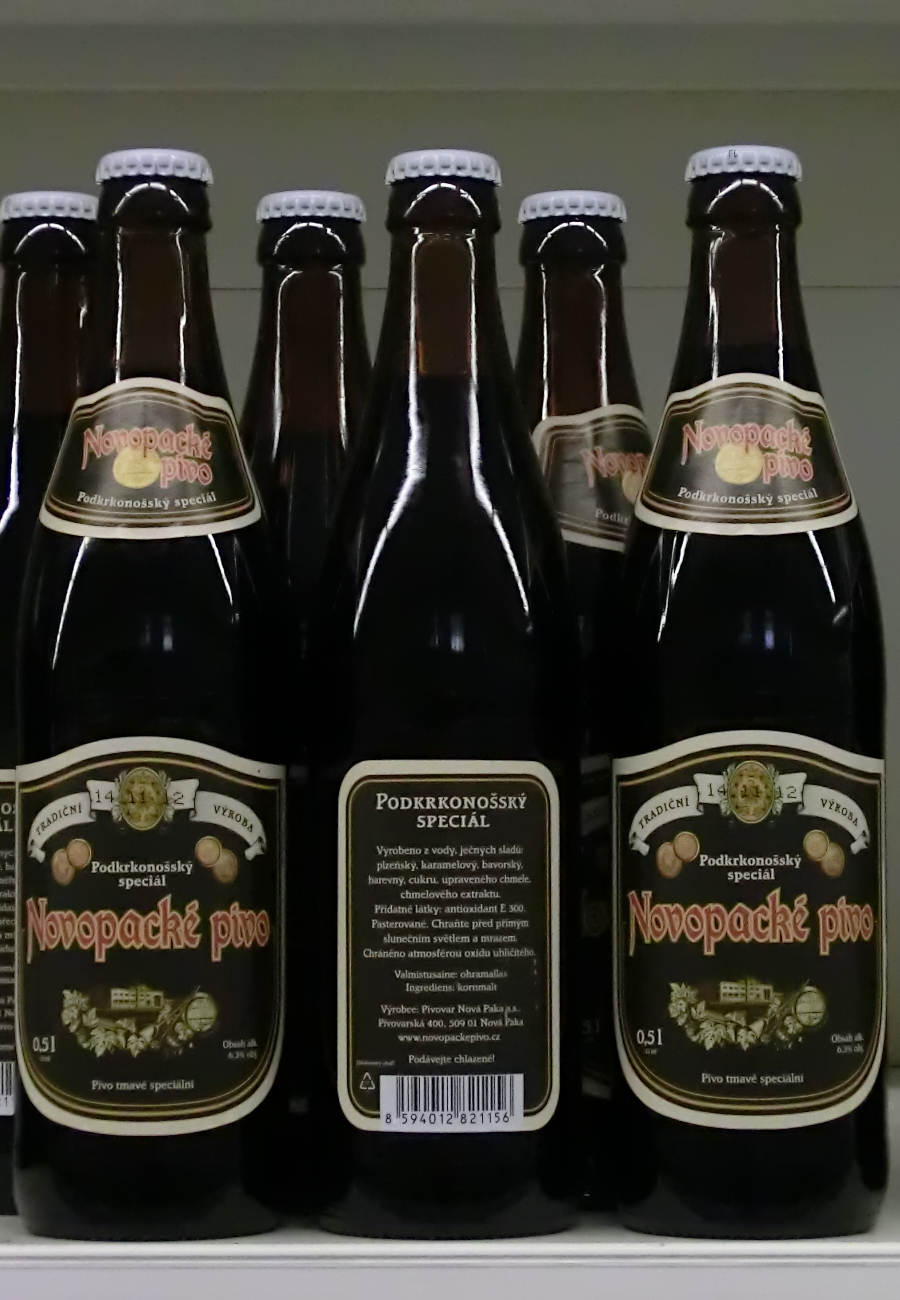 Láhve piva z Pivovaru Nová Paka a.s.: Podkrkonošský speciál, světlý speciál 14°